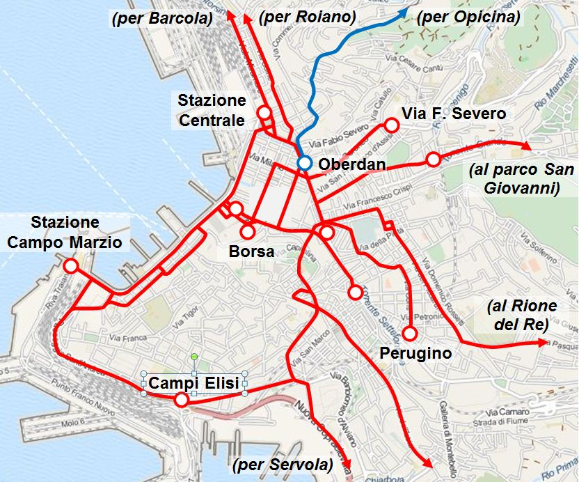 Rete tranviaria di Trieste